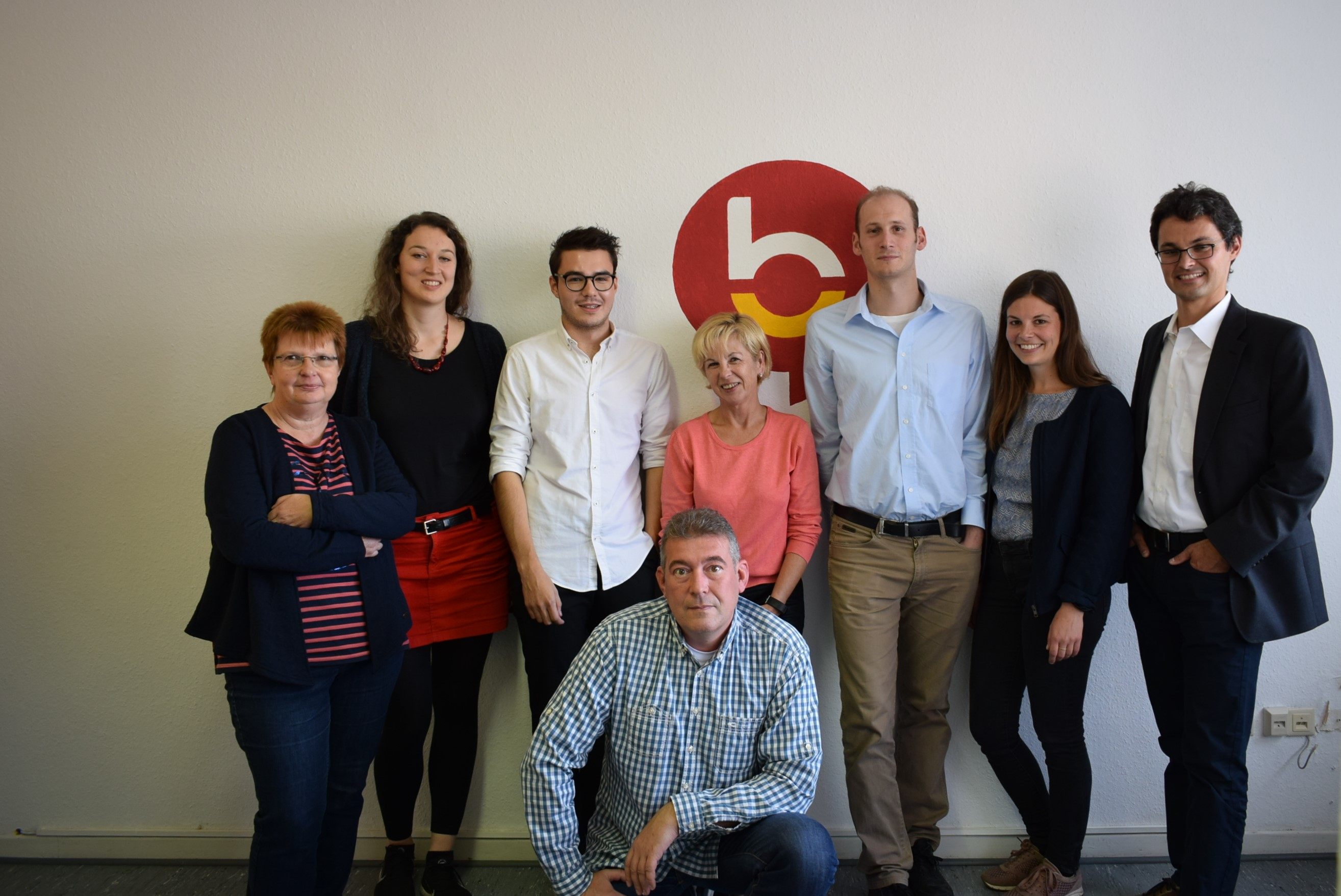 Das Team des Heinz-Kühn-Bildungswerks